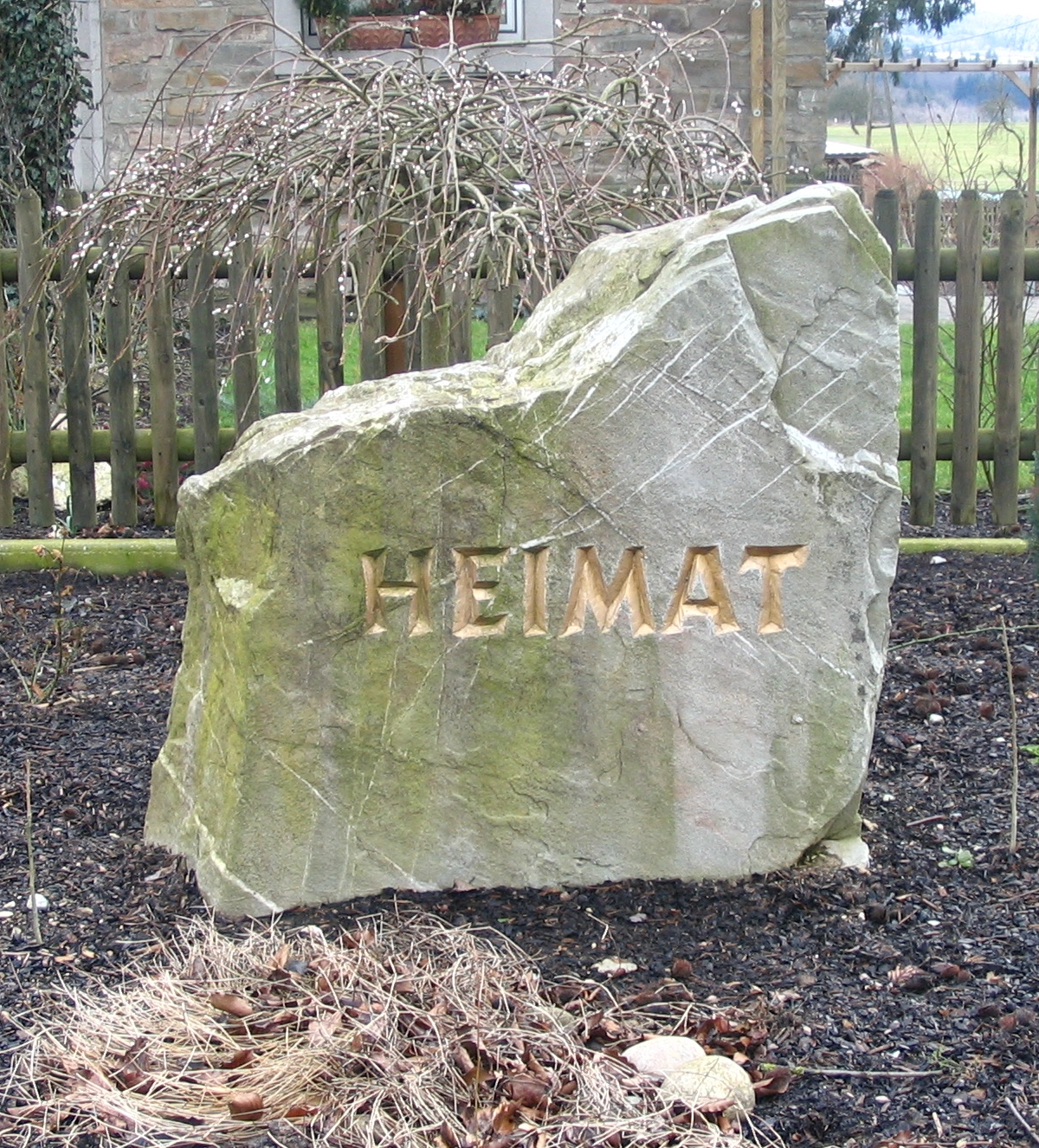 Heimatstein in Woppenroth